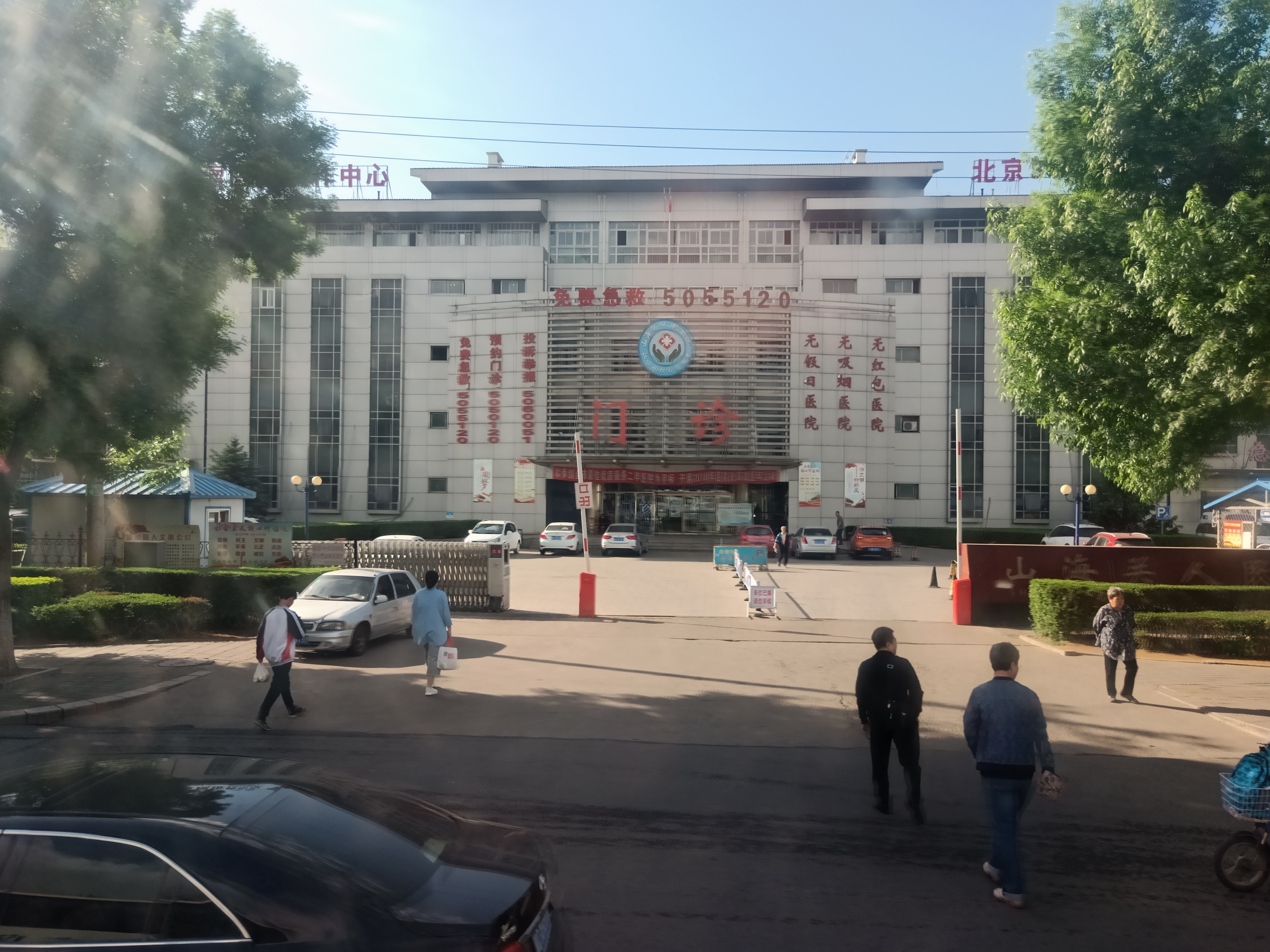 粵語: 山海關人民醫院